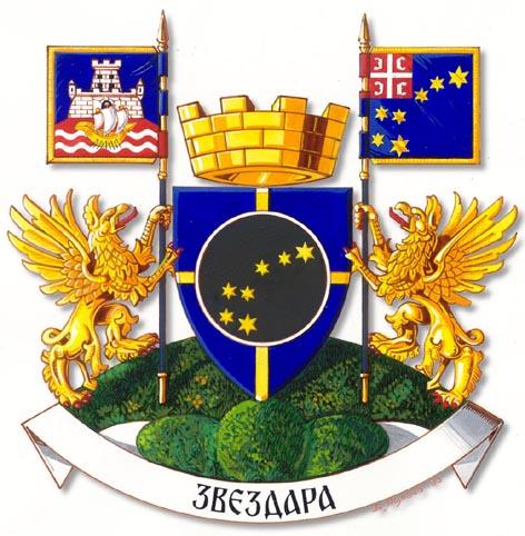 Das Wappen der Stadt und Gemeinde Zvezdara